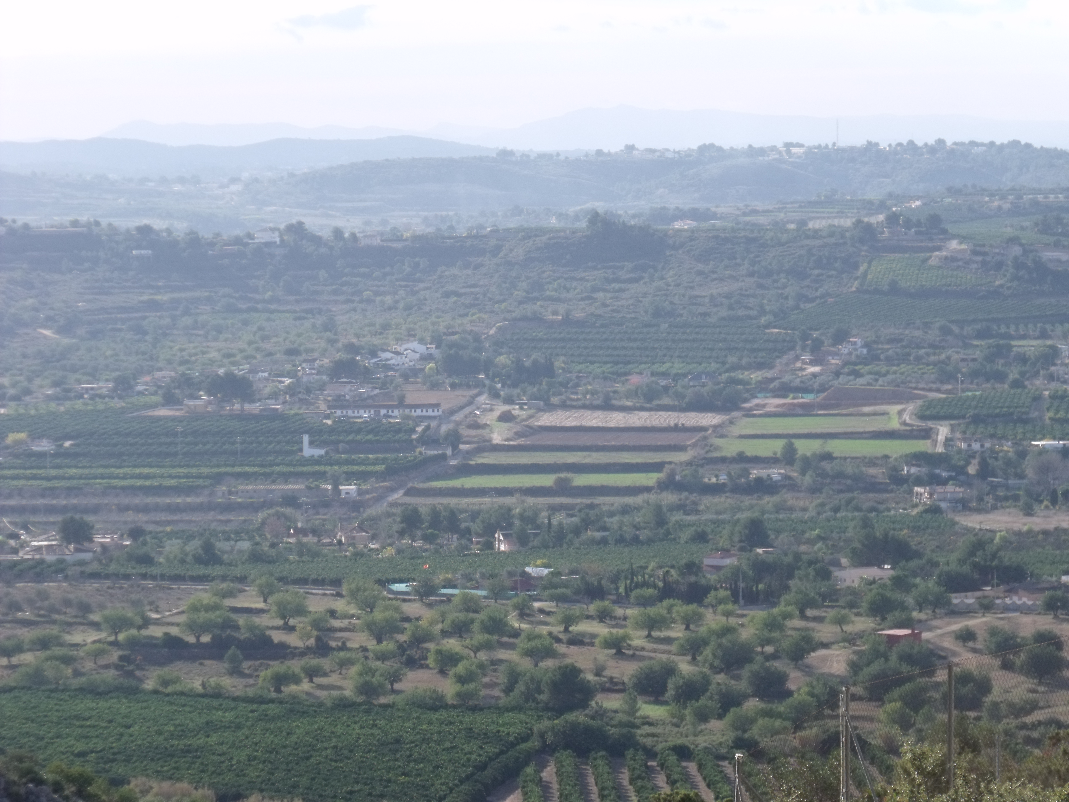 El valle del Barranco de La Horteta vista desde el norte.